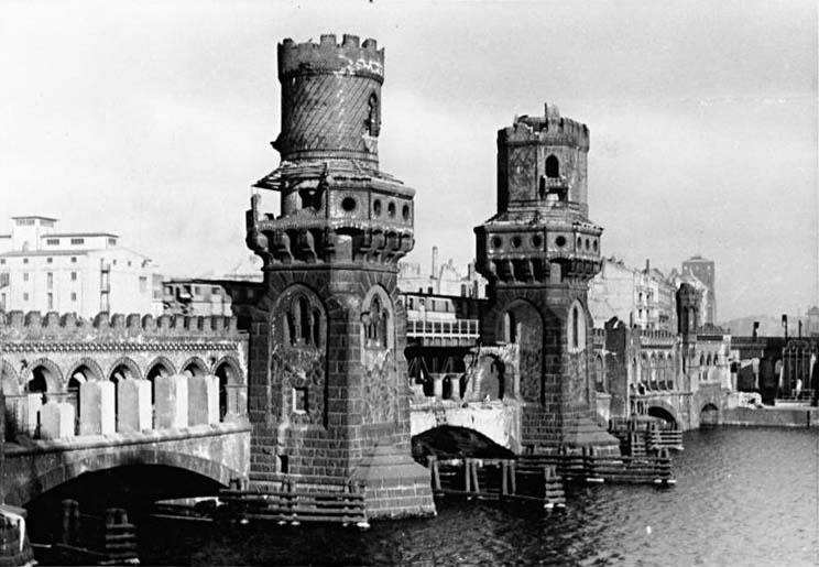 Berlin, Oberbaumbrücke, beschädigt Berliner Brückenschwerpunkte In dem Wiederaufbauprogramm Berlins nehmen die Straßenbrücken einen wesentlichen Teil ein. UBz: Die Oberbaumbrücke, jenes merkwürdige Gebilde aus dem Spielbaukasten-Stil wird repariert. Aufn.: Illus Funck 5217-50 Jan. 50